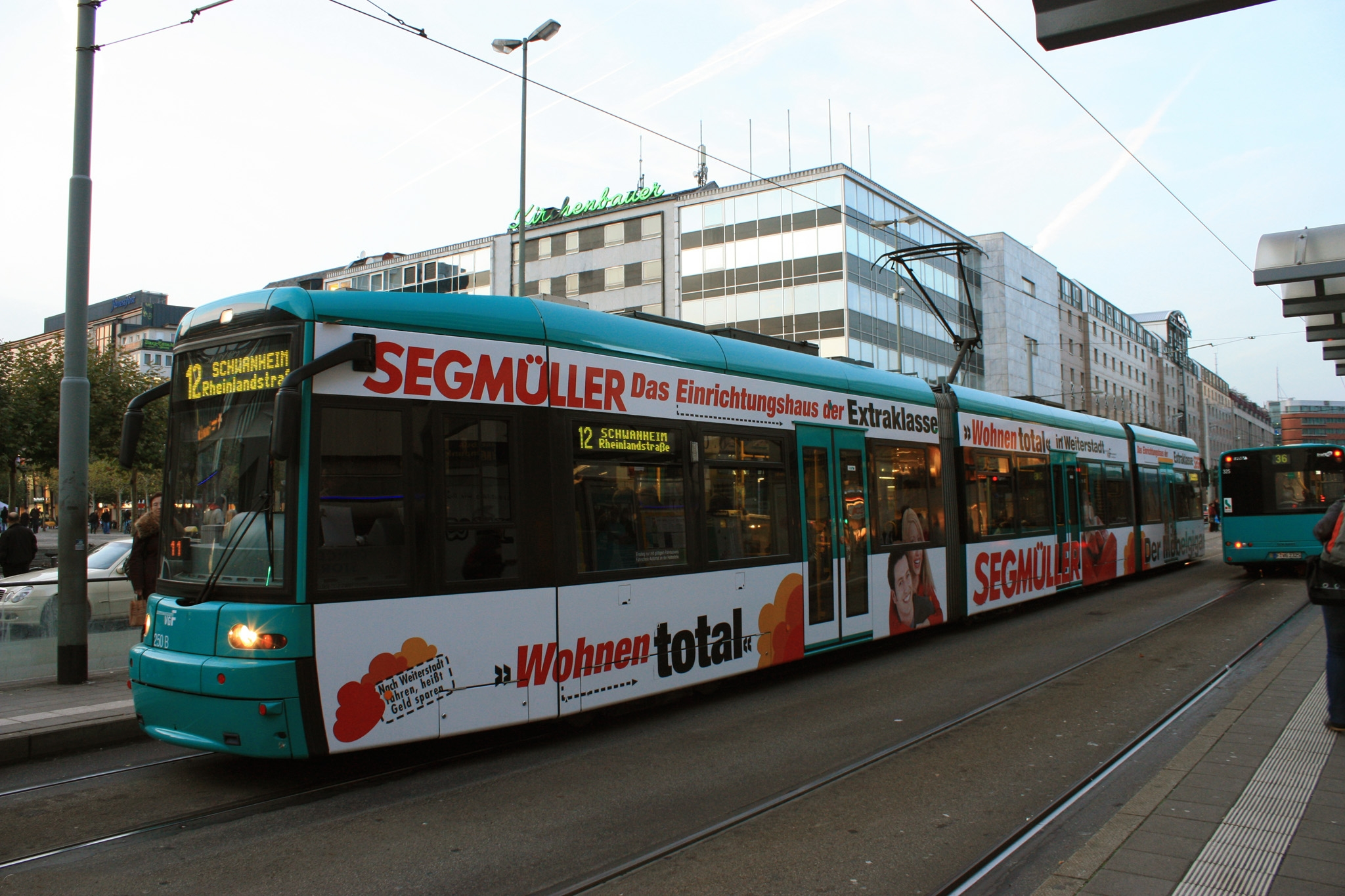 S-Wagen 250 als Linie 12 mit einer Segmüller Vollreklame an der Haltestelle Konstablerwache in Frankfurt am Main